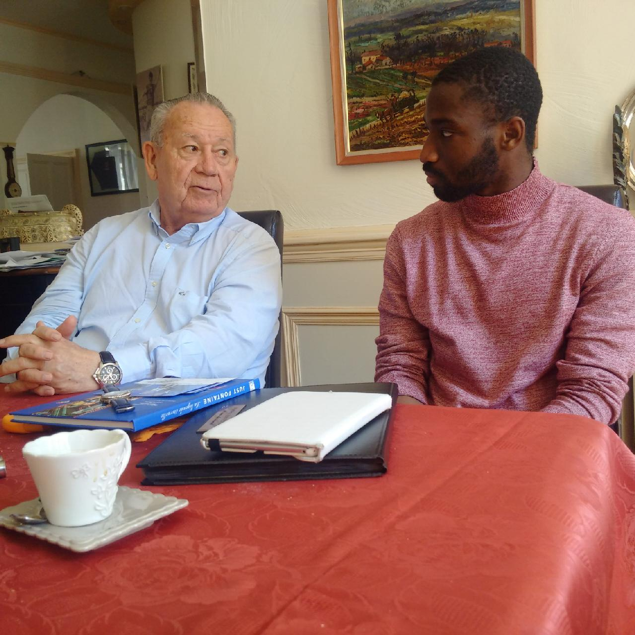 Anthony Koura avec Just Fontaine, meilleur buteur de l'histoire de la coupe du Monde.